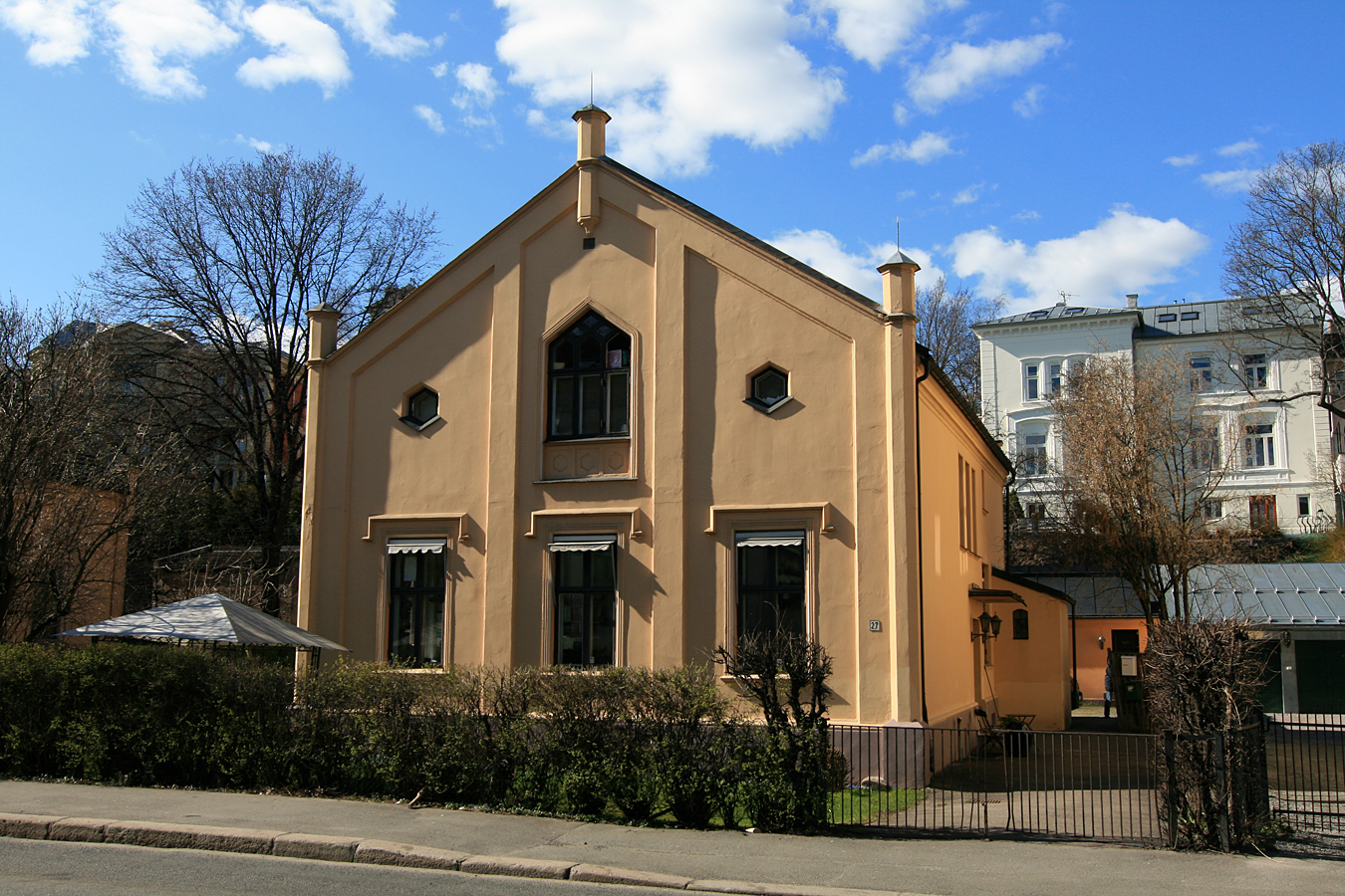 Josefines gate 27, Oslo. bygd 1869; arkitekt Hans Olsen.